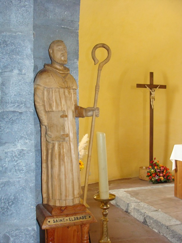 Statue de Saint-Eldrade dans l'église de Monestier-d'Ambel (Isère, France)